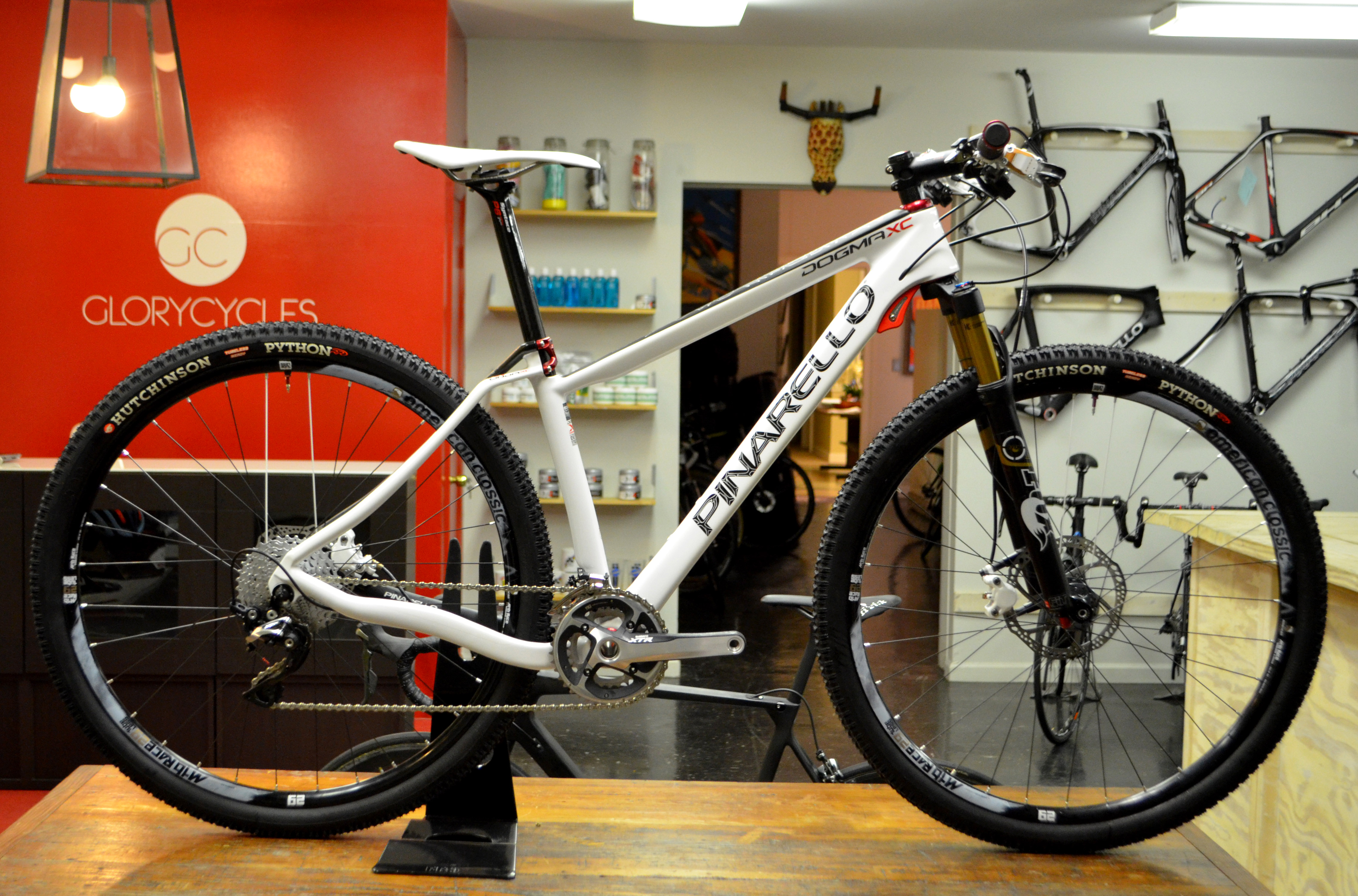 Pinarello Dogma XC Shimano XTR Custom Bike